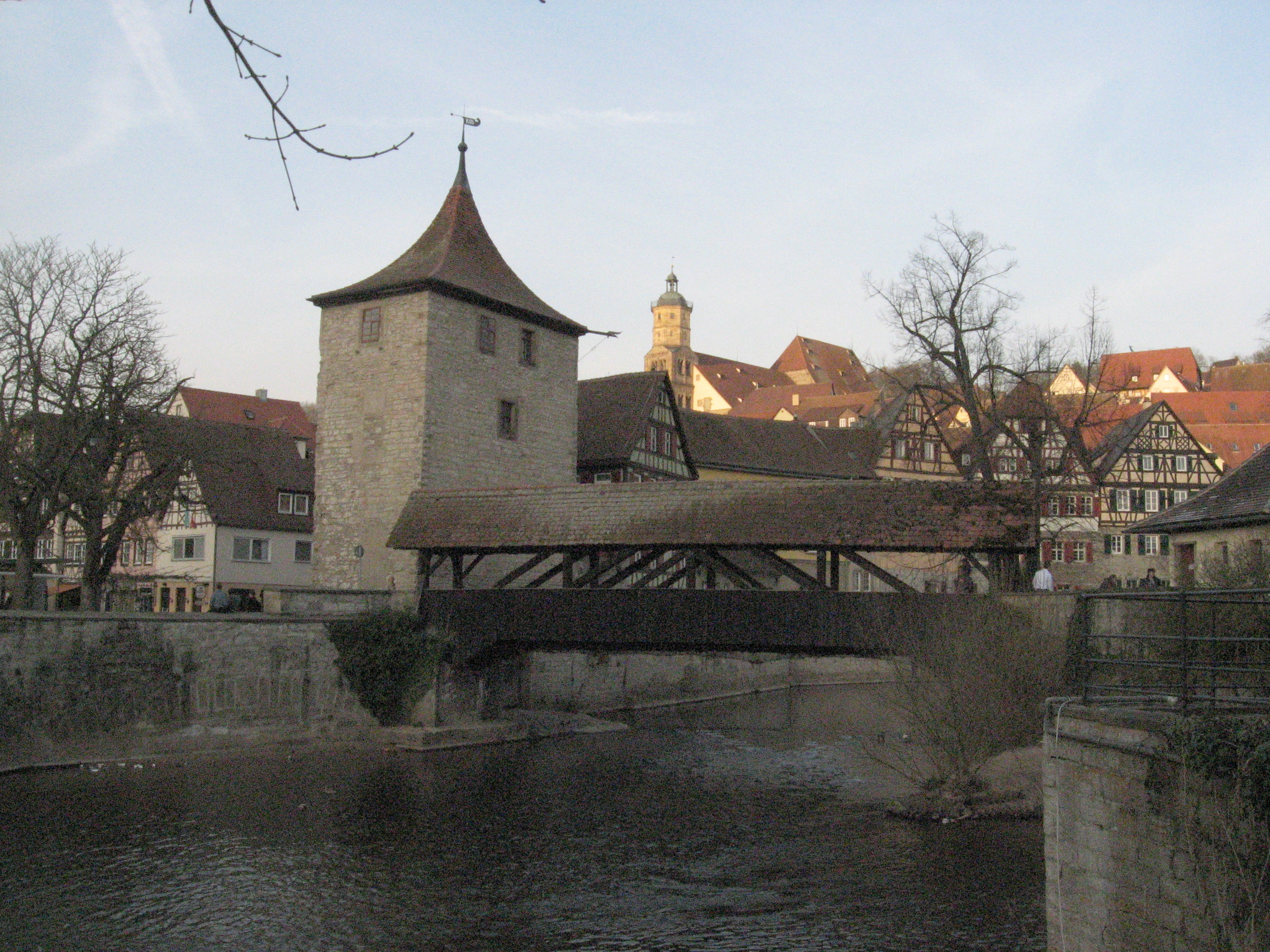 Sulfersteg mit Sulfertor an einem Arm des Kochers in der Schwäbisch Haller Altstadt. Das Sulfertor schützte ursprünglich eine Furt neben dem späteren Steg.